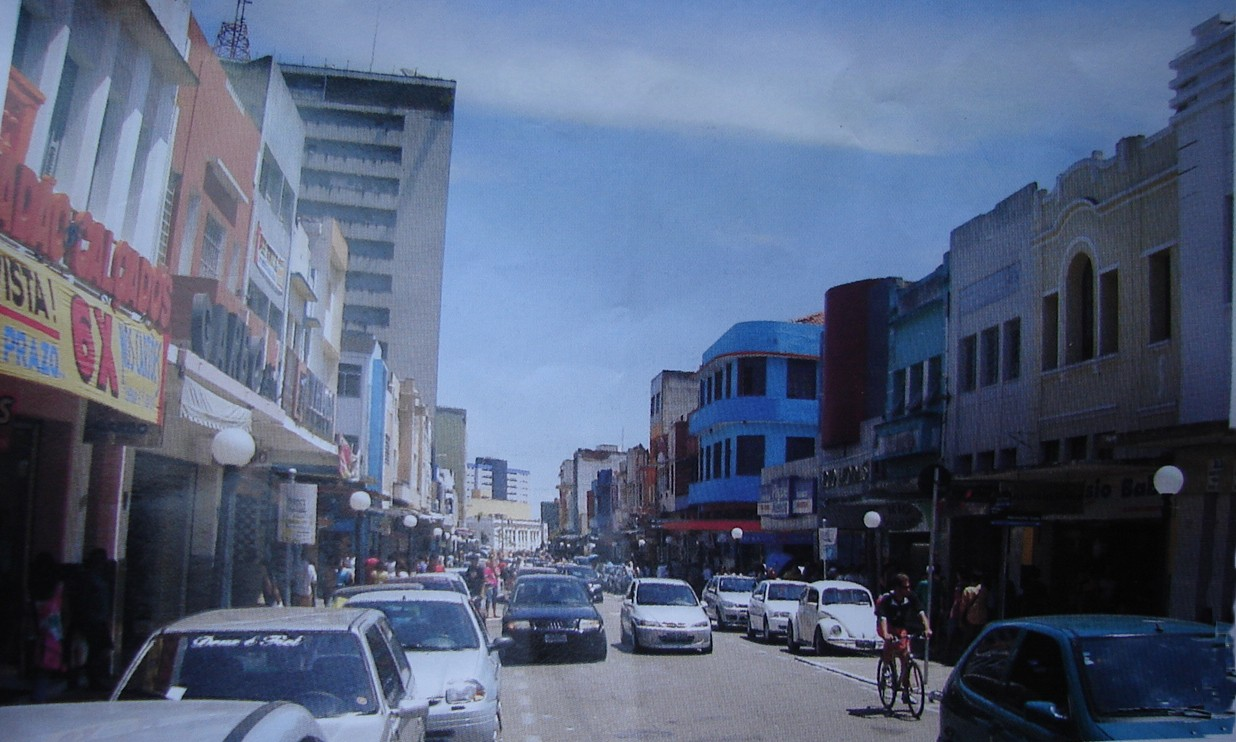 Foto da Rua Maciel Pinheiro, em Campina Grande, Brasil.